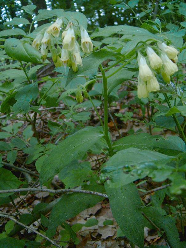 Česky: Přírodní park Baba